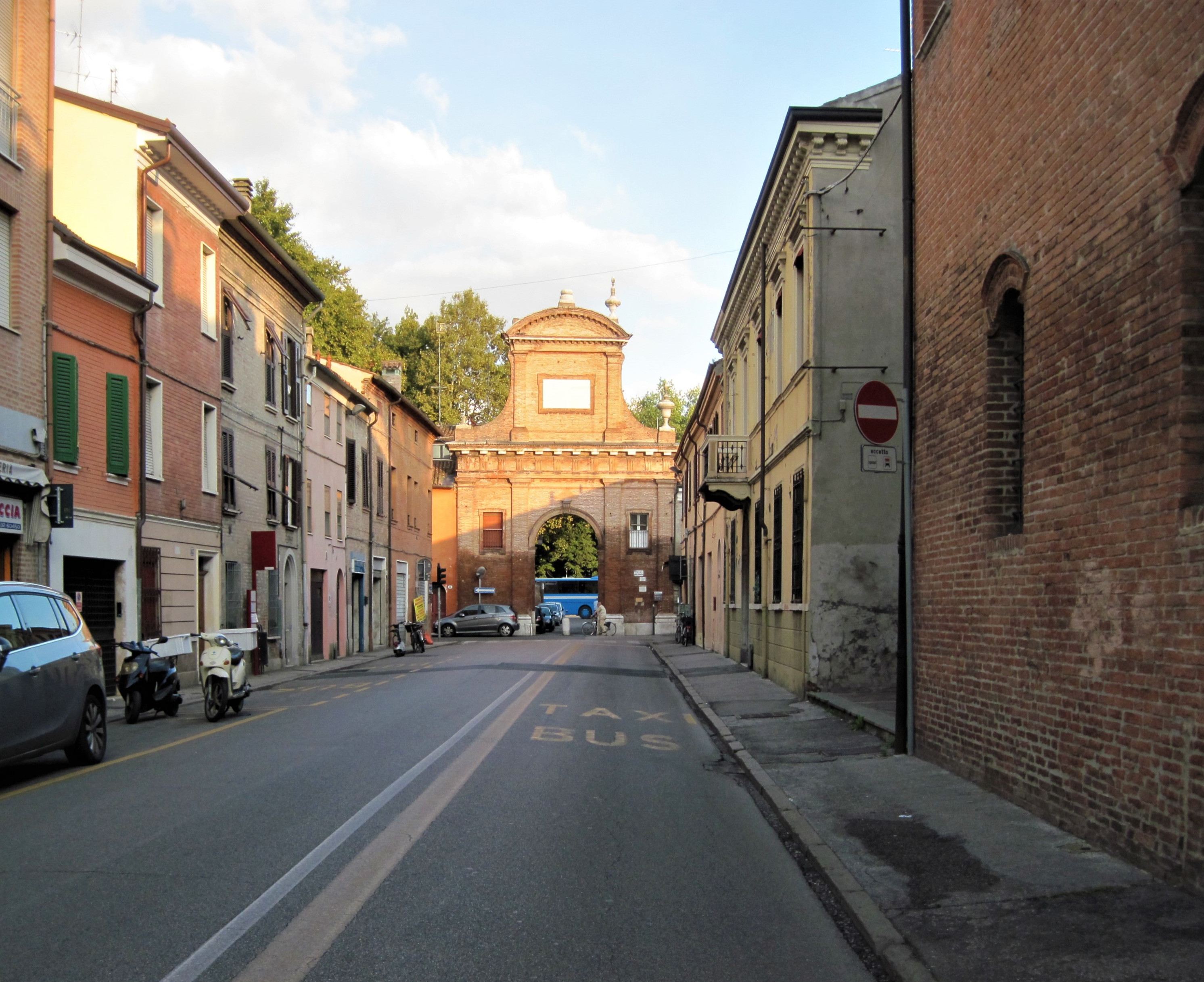 Prospettiva della Ghiara. A destra casa di Biagio Rossetti.